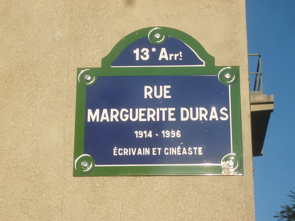 Paris 13e arrondissement - Rue Marguerite-Duras - plaque de rue